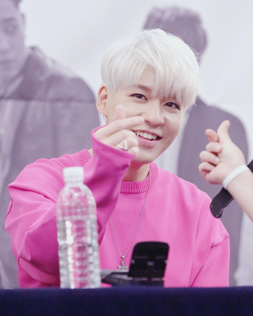 170504 젝스키스 팬사인회 은지원 이재진 김재덕 강성훈 장수원